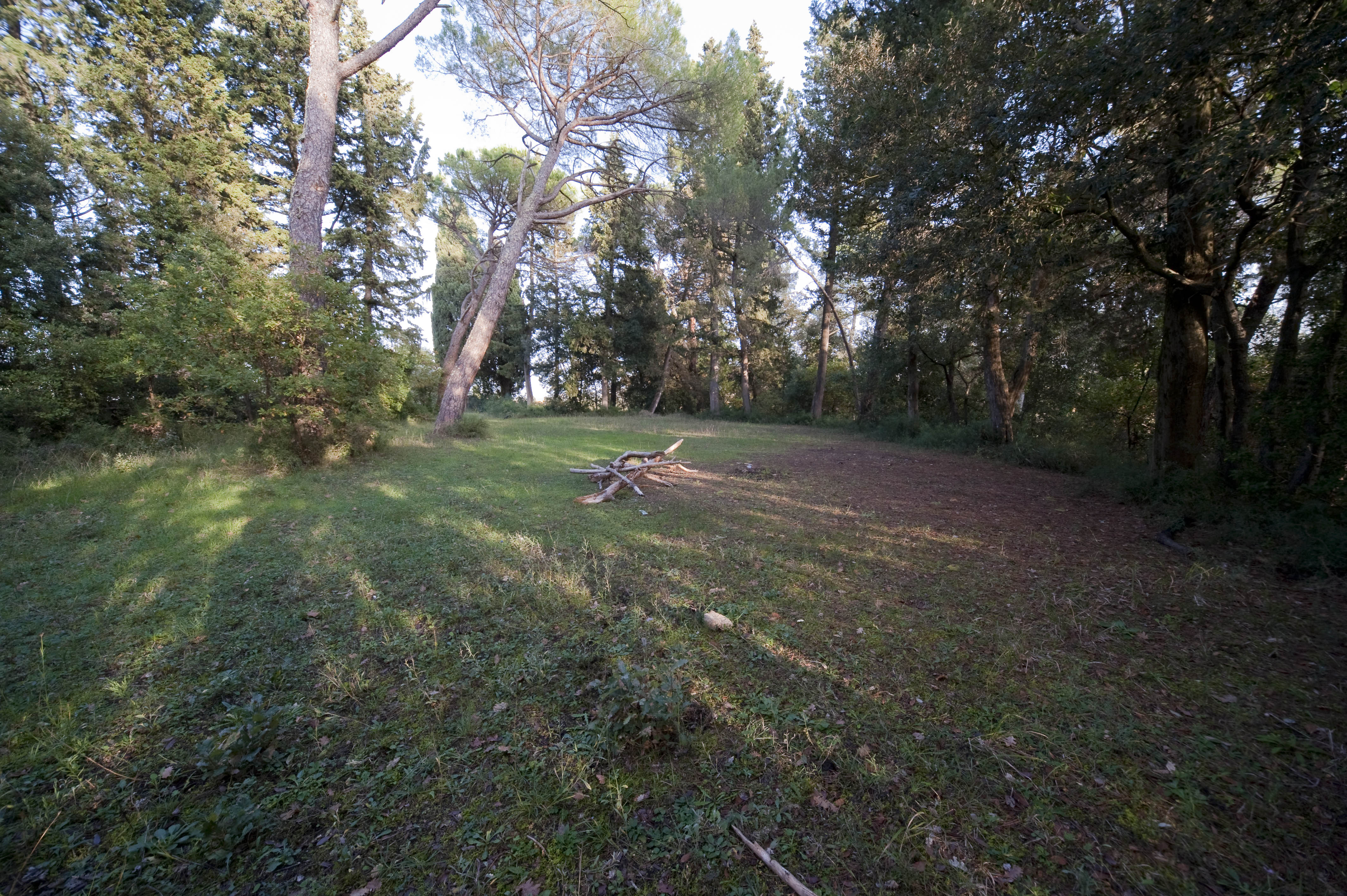 Il Tondo, probabile sede di una delle torri angolari della Rocca di Capo Bagnolo - Semifonte